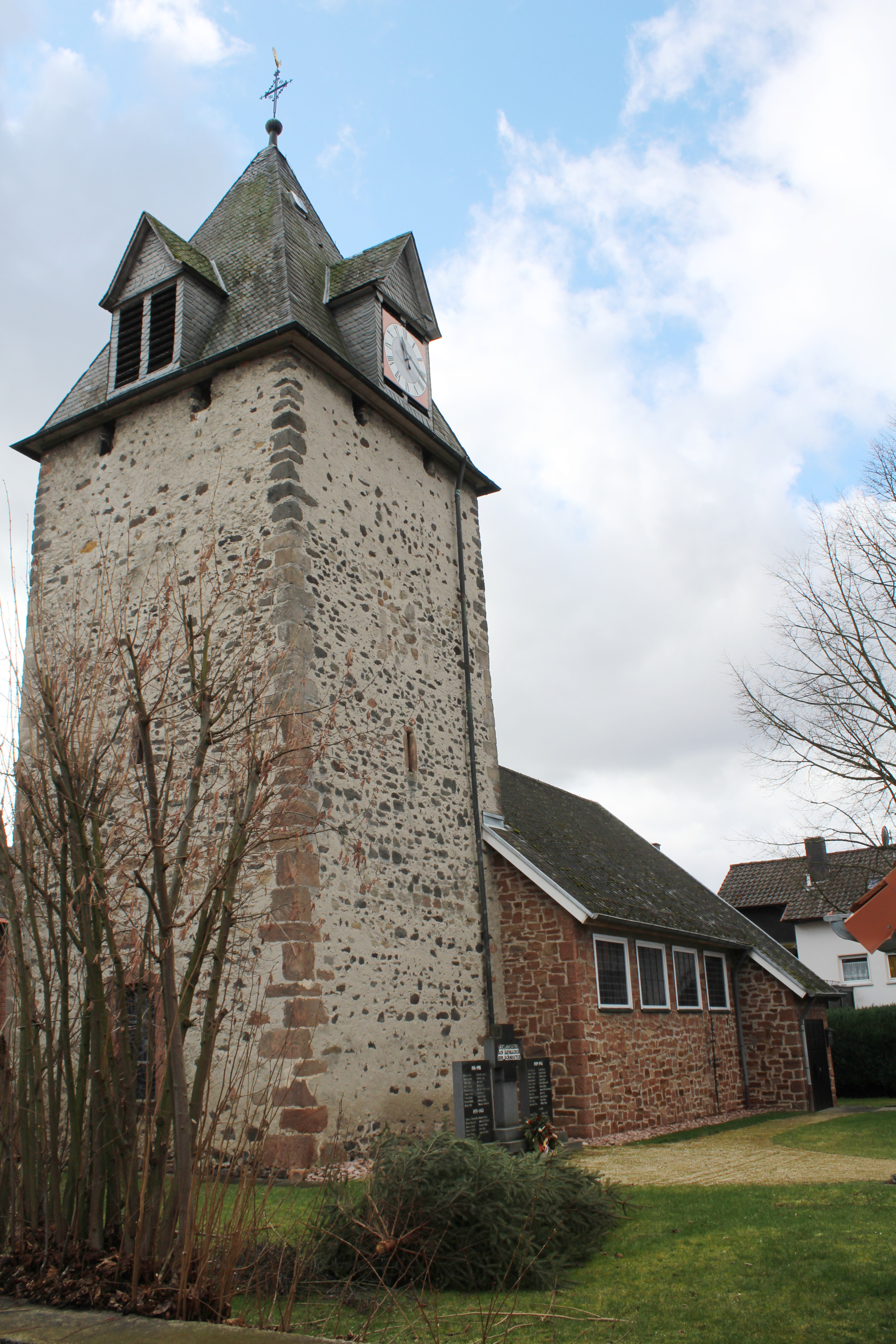 Evangelische Kirche Leidenhofen, Gemeinde Ebsdorfergrund, Landkreis Marburg-Biedenkopf, Hessen, Deutschland